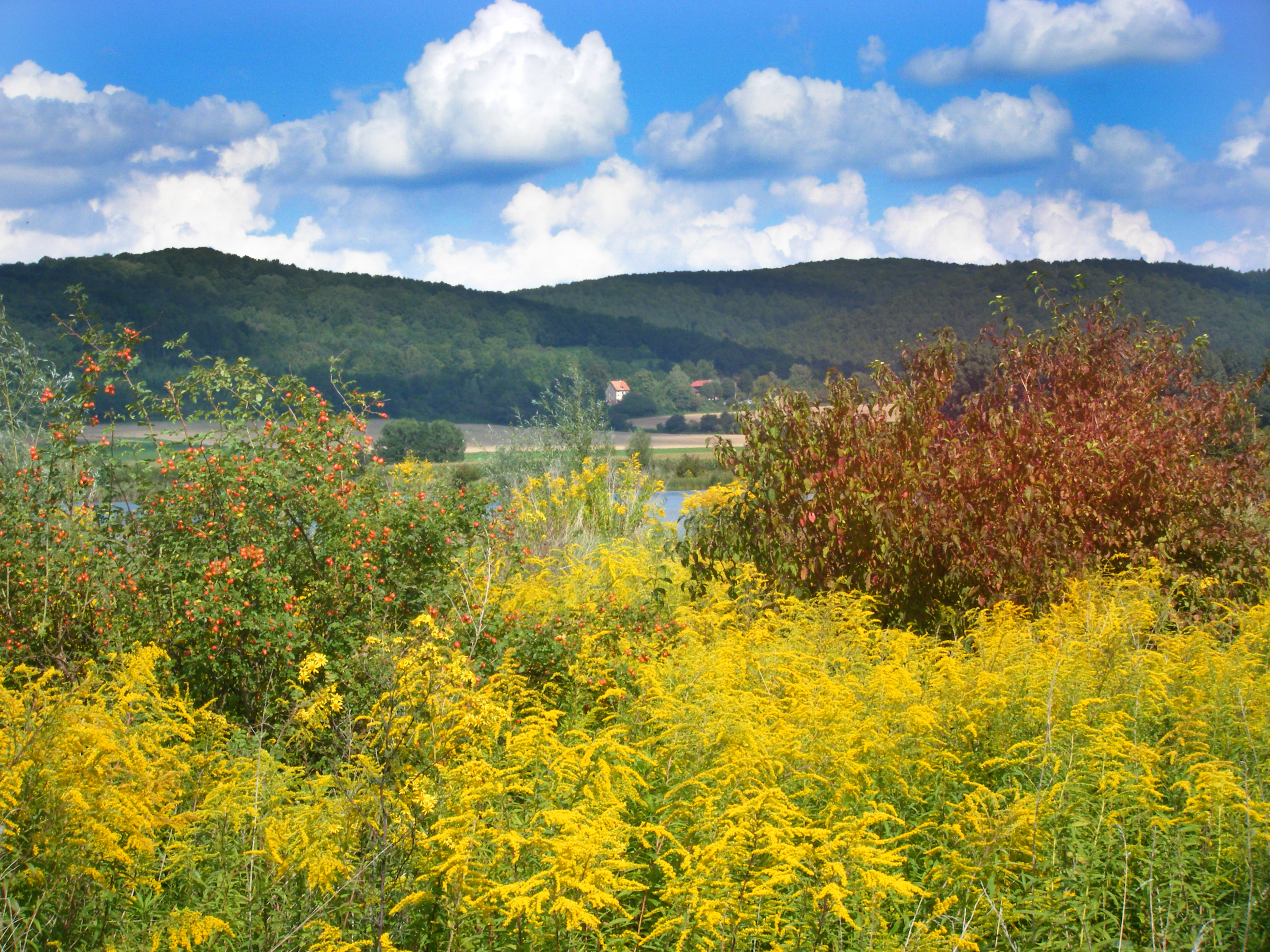 Naturschutzgebiet Mönchesrieth bei Grebendorf, WDPA ID 318800. (Blick Richtung Nordosten mit Gelben Berg (li) und Dachsberg (re))